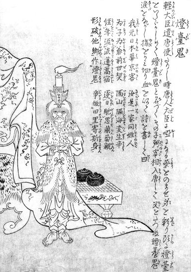 Tōdaiki (燈台鬼) from the Konjaku Hyakki Shūi (今昔百鬼拾遺)